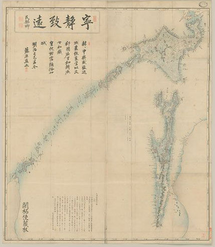 1869年